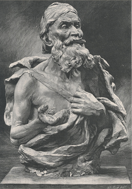 Marguerite Jacob de Bazin, El Mendigo, reproducción de la obra de Simon Gonzalez, grabado en madera, Revista Selecta, Octubre de 1909, Año 1, número 7, p. 230